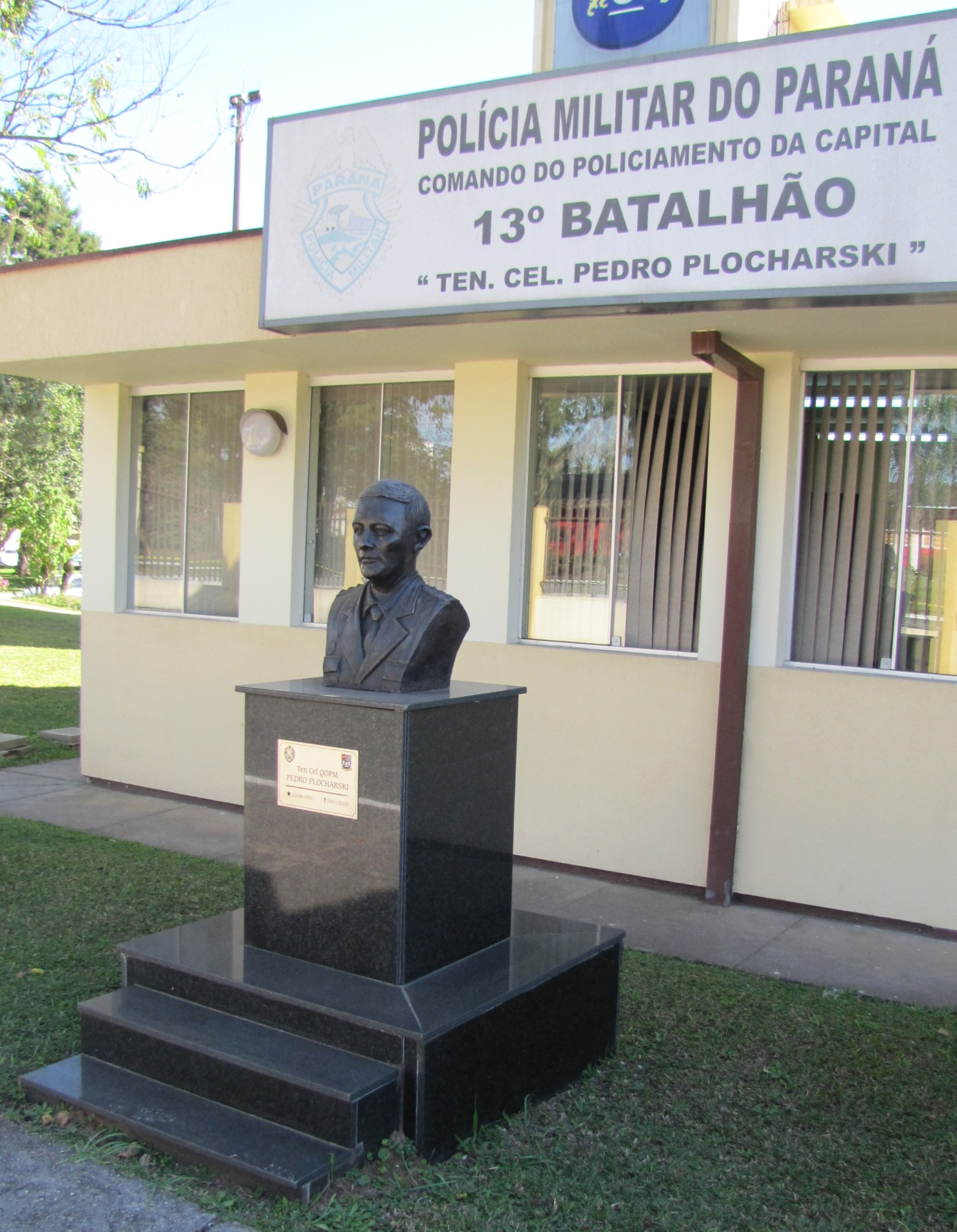 Busto do Ten-cel Pedro Plocharski, patrono do 13º Batalhão da Polícia Militar do Paraná.